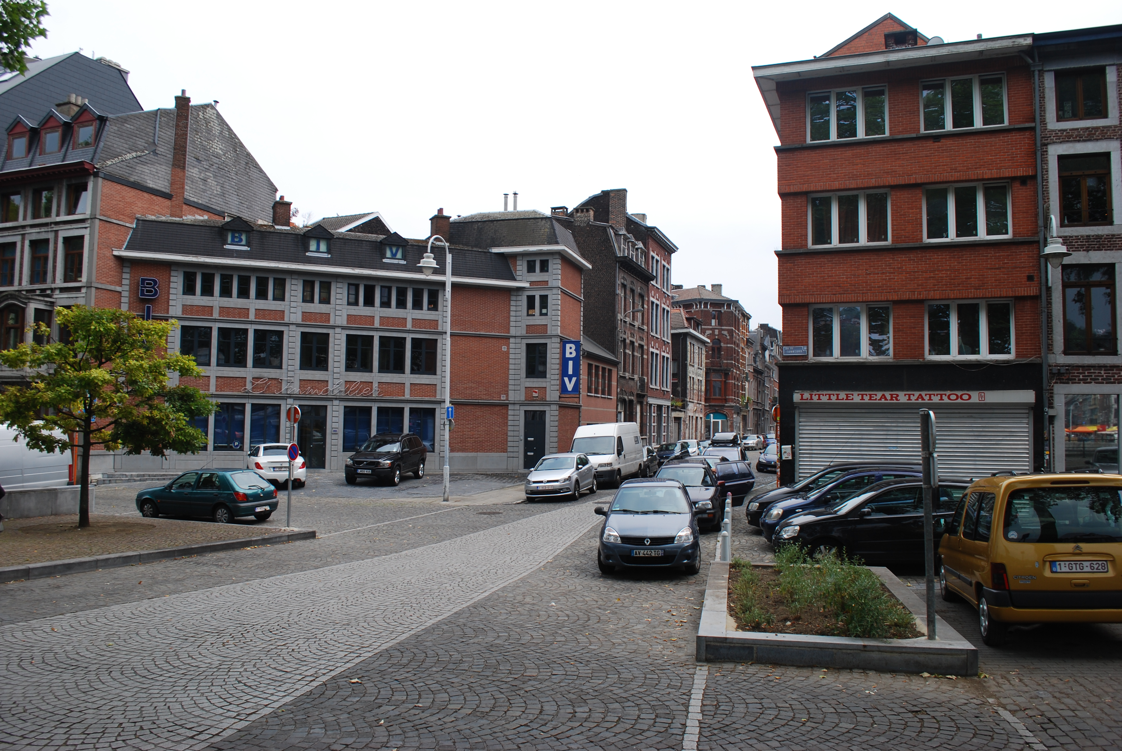 Vue de Liège.